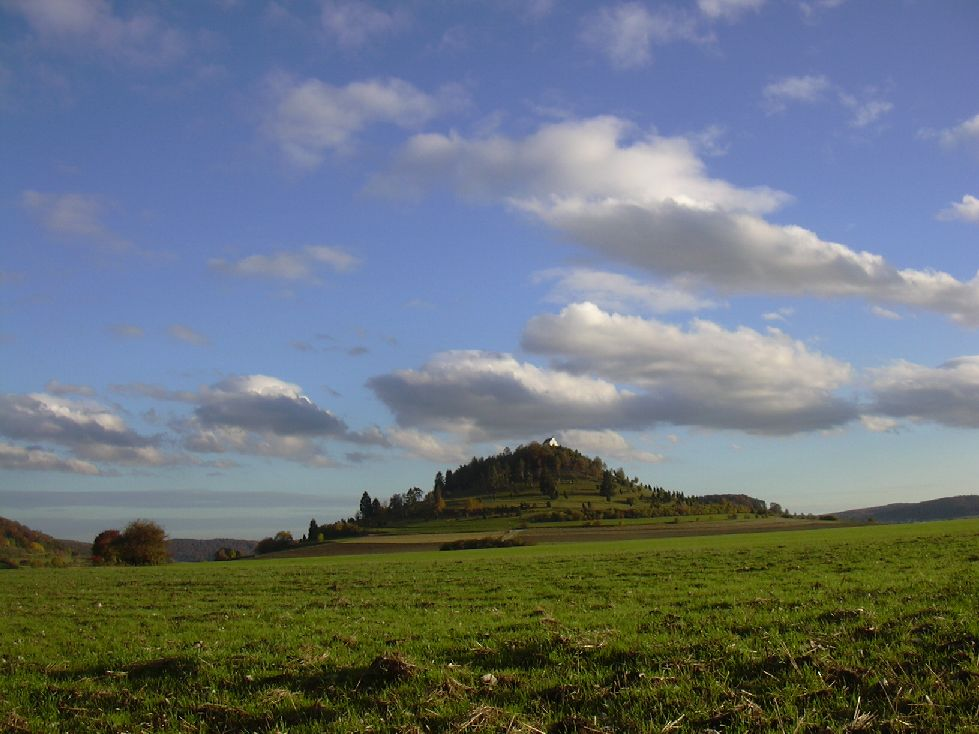 Kornbühl, Salmendingen - Schwäbische Alb